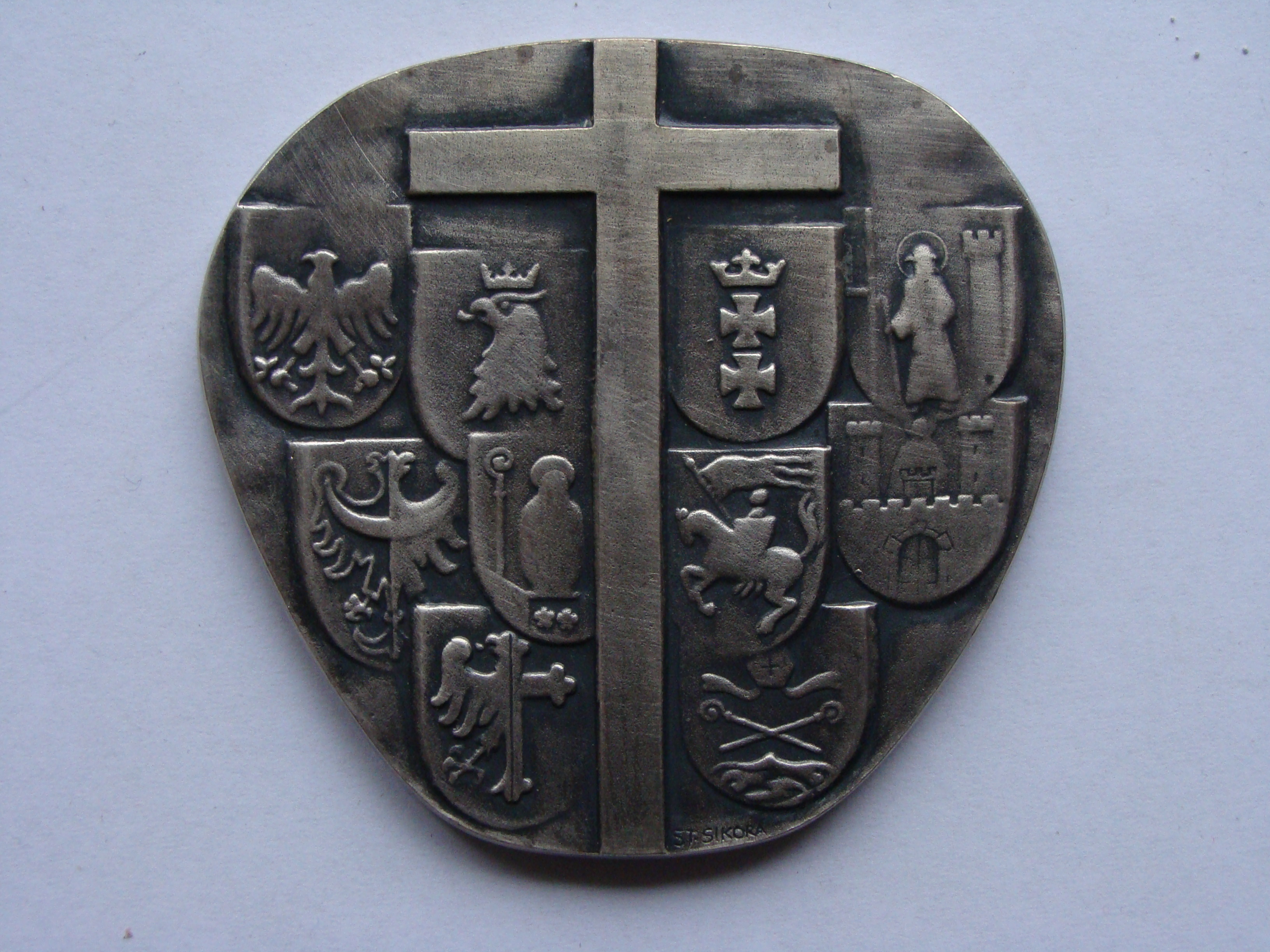 Medal - Diecezje polskie na ziemiach odzyskanych